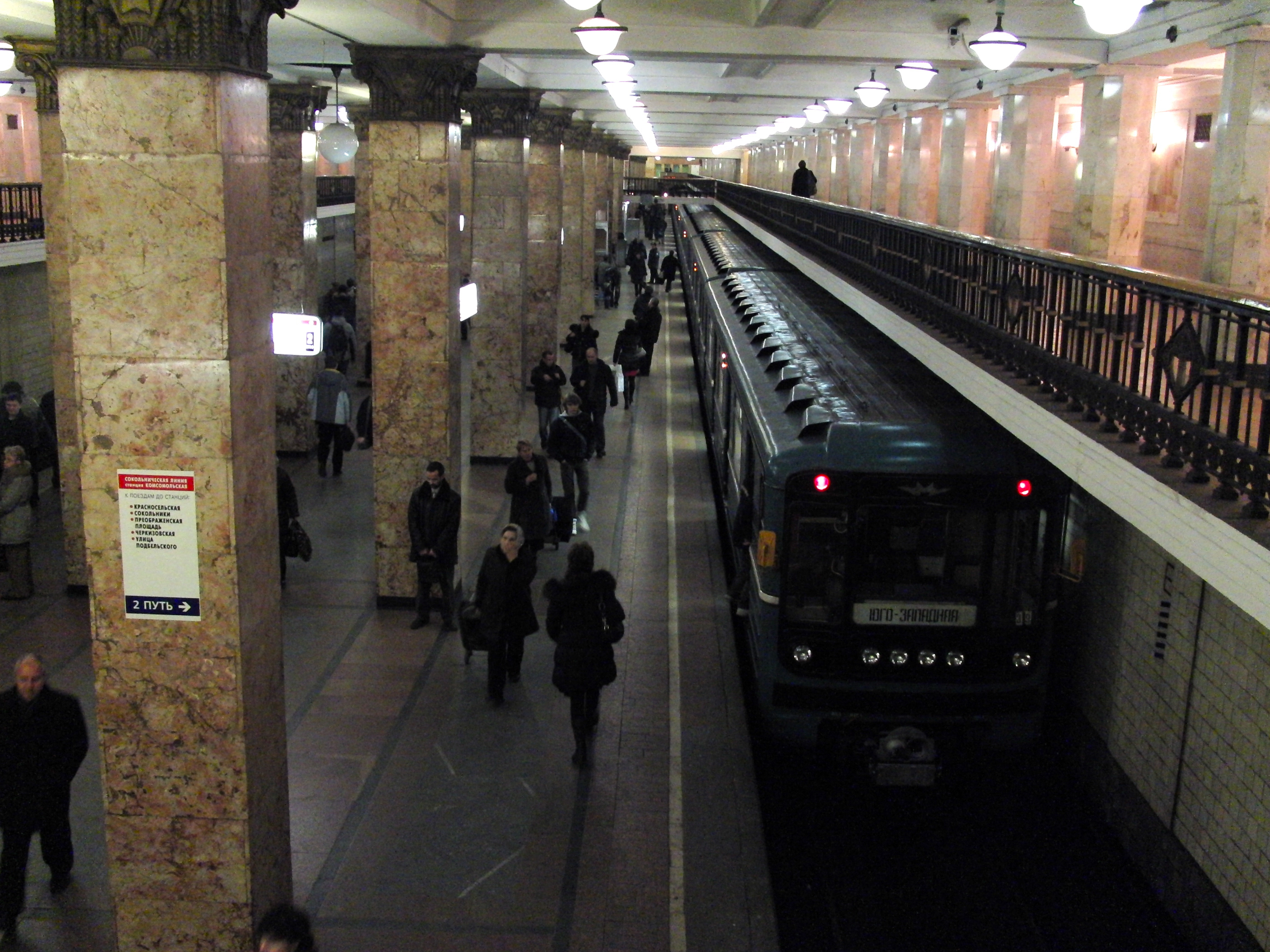 Komsomolskaya-radialnaya (Комсомольская-радиальная)